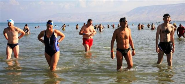 צליחת הכנרת - סיום בחוף צמח